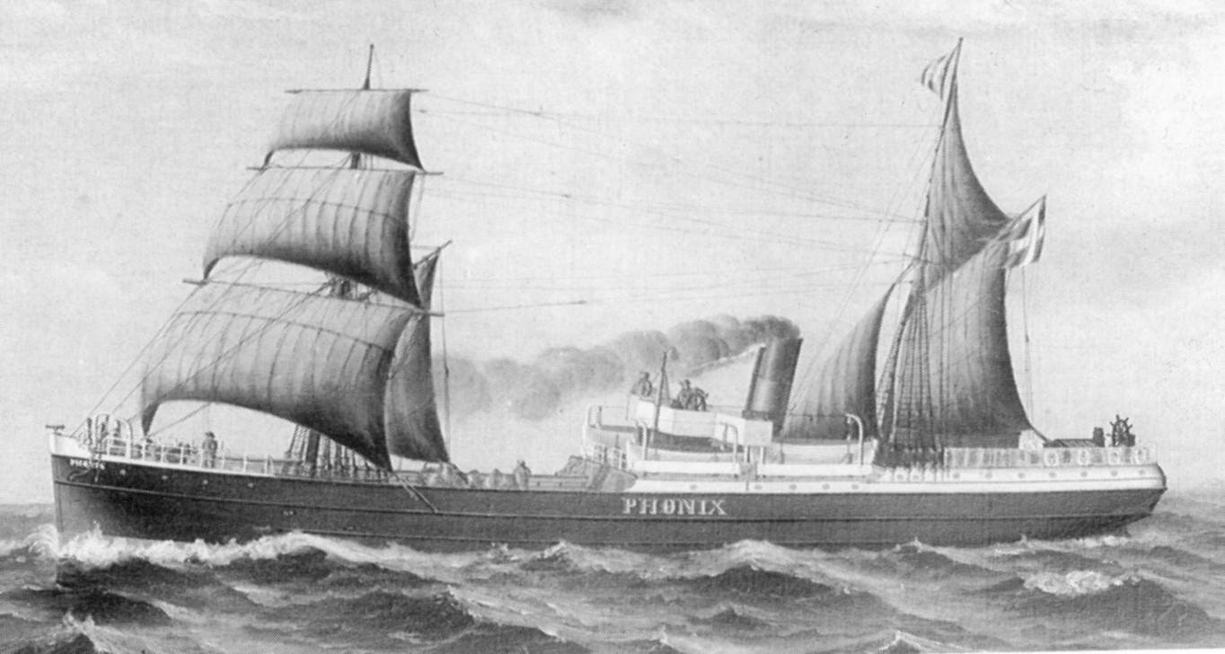 Teiknuð mynd af Phönix (DFDS)